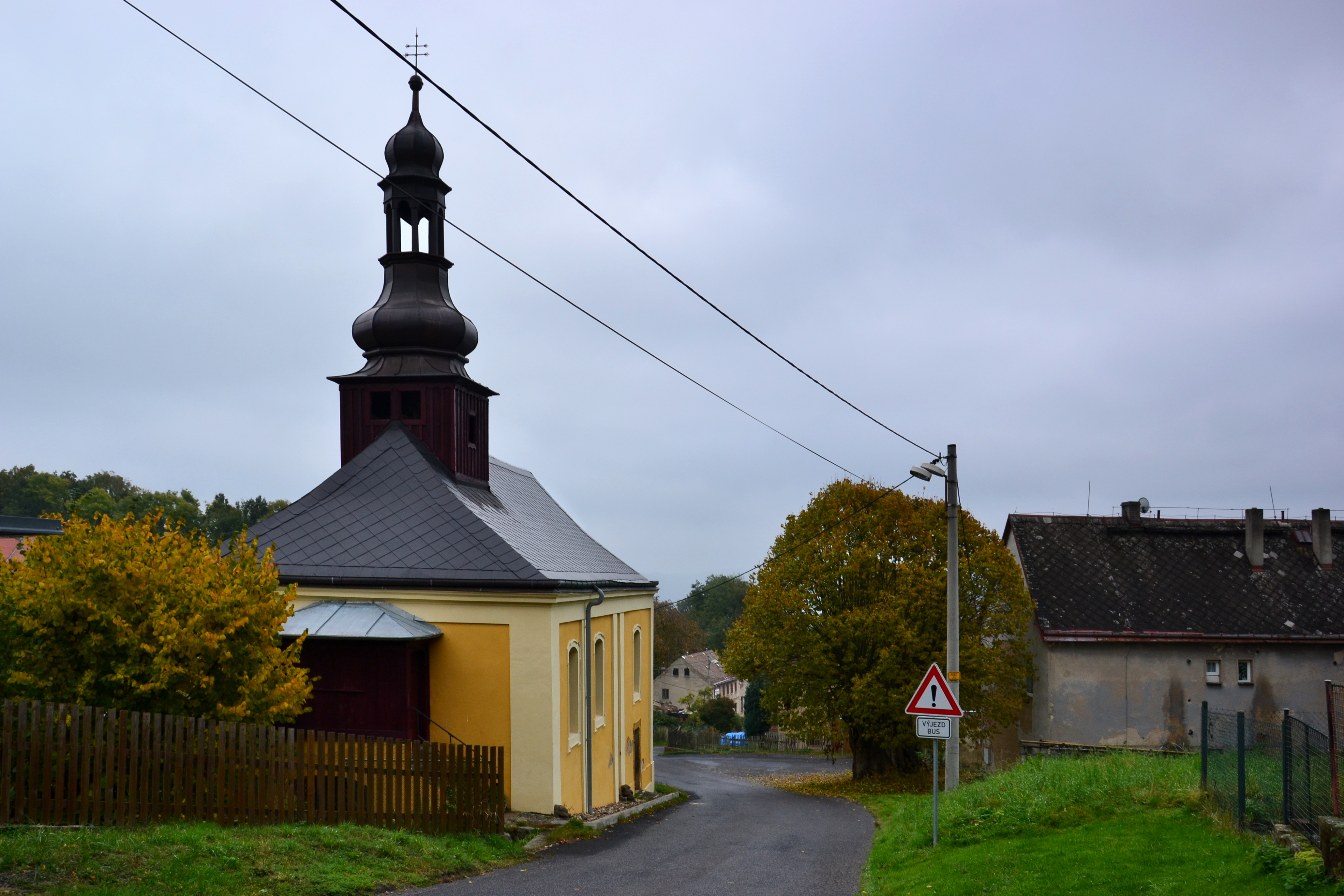 Kostel svatého Prokopa, parc. 29, Javory (Malšovice).